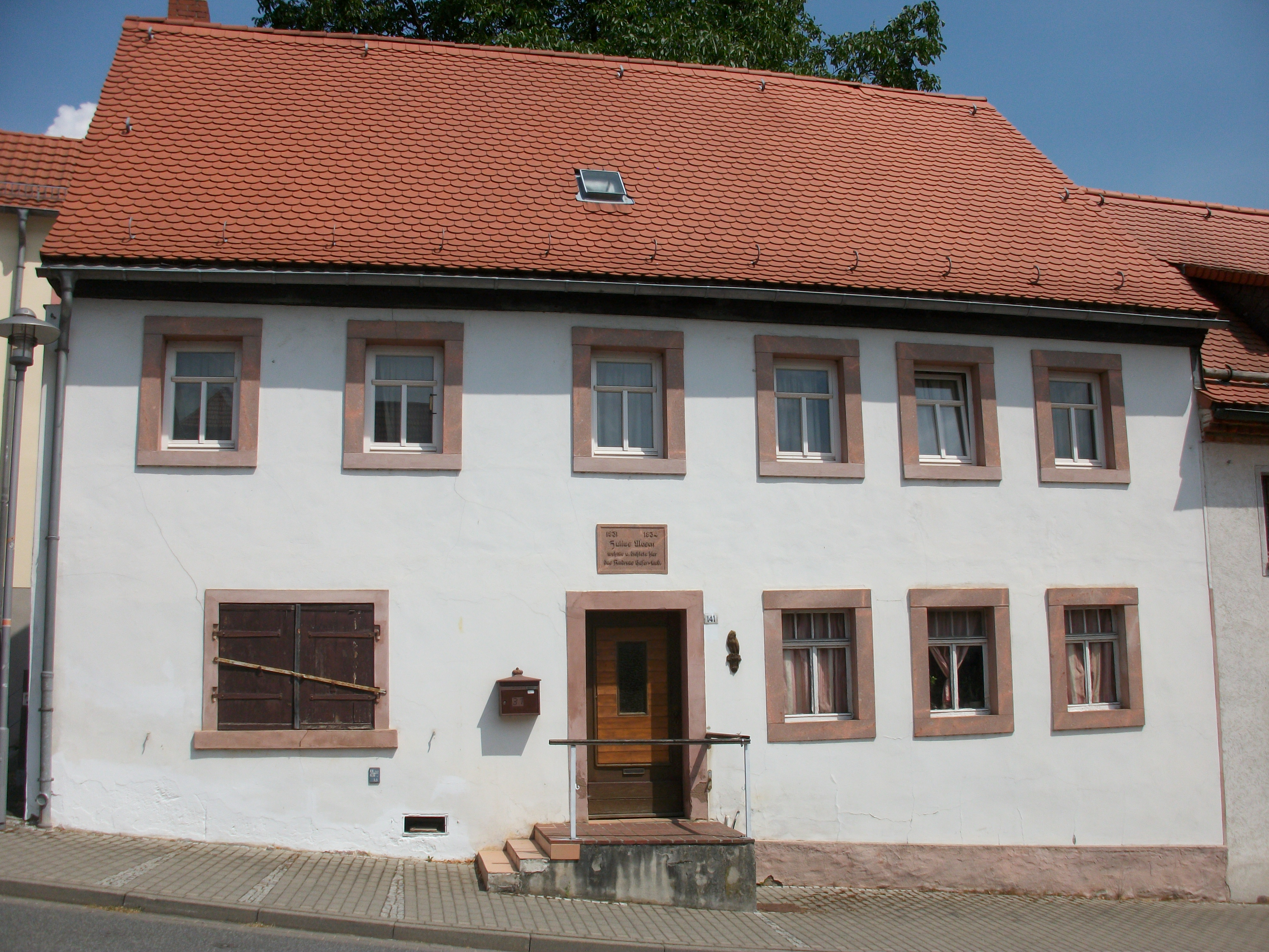 Kohren-Sahlis, Markt 141 (Wohnhaus Julius Mosen)